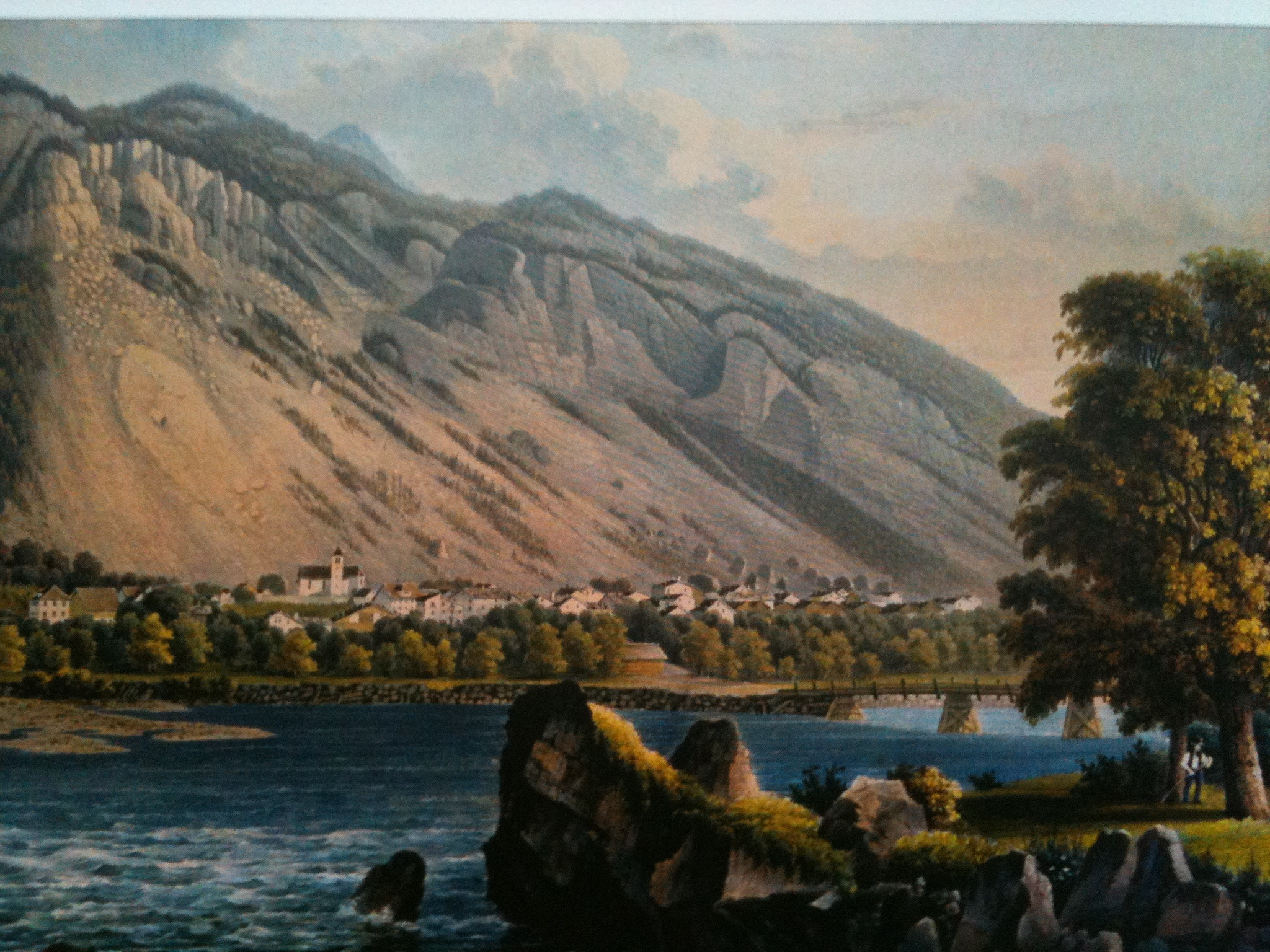 Felsberg Gr im Kanton Graubünden, Aquatinta von Caspar Burkhart (Originalbild im Rätischen Museum Chur)